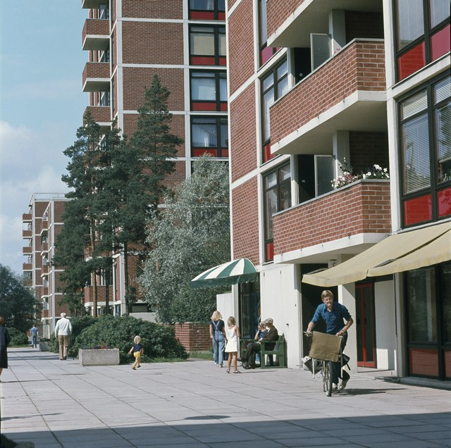 Olarin kerrostaloja